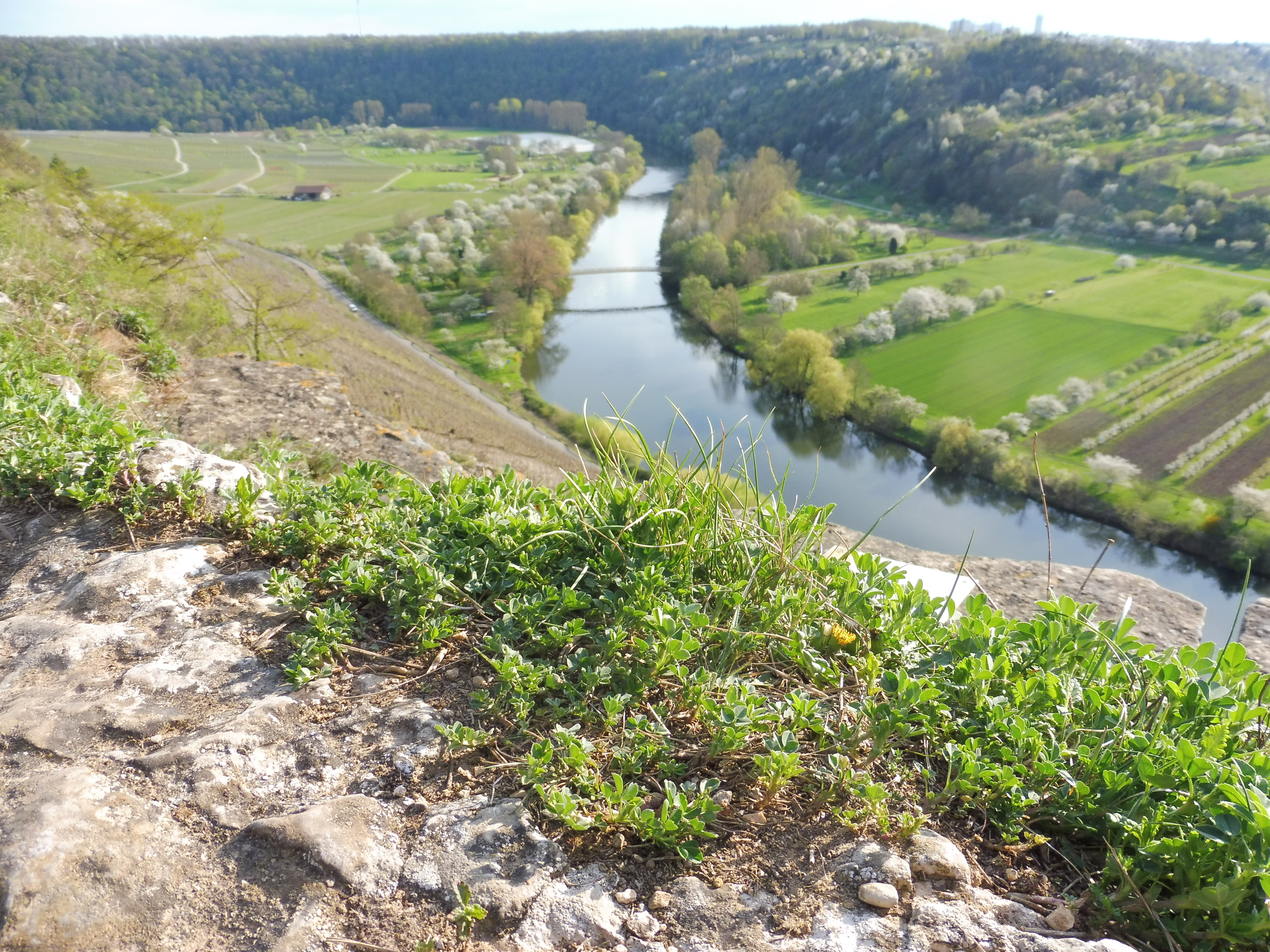 Schlesischer Löwenzahn (Taraxacum parnassicum) Naturschutzgebiet Felsengärten Hessigheim 16. April 2018